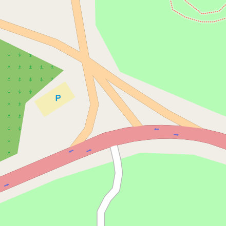 Героїв Великої Вітчизняної Війни площа в Києві